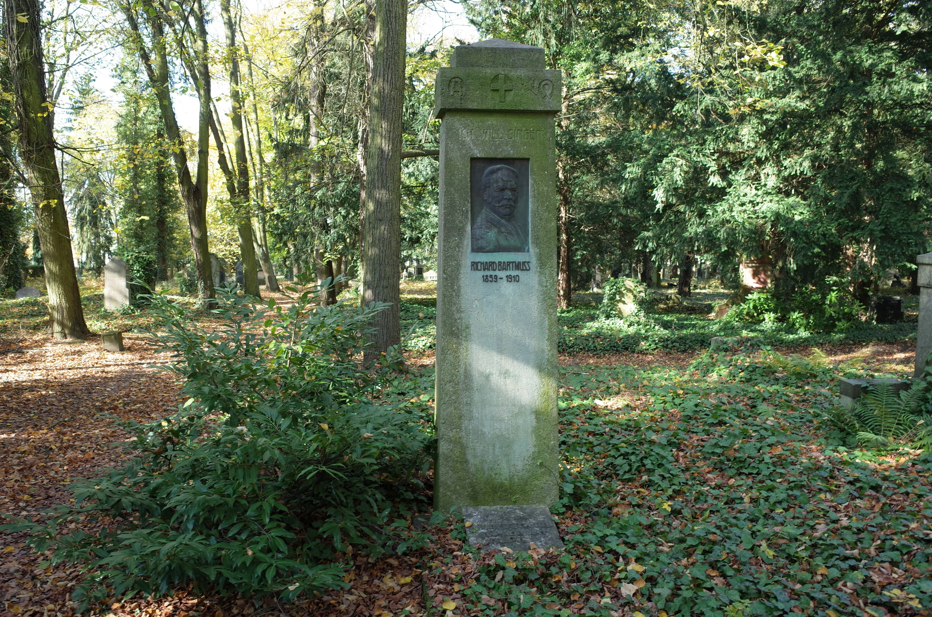 Dessau-Roßlau, Grab von Richard Bartmuss auf dem Friedhof 3. Innschrift umlaufend über dem Relief: ICH WILL SINGEN ; VON DER ; GNADE DES HERRN ; EWIGLICH